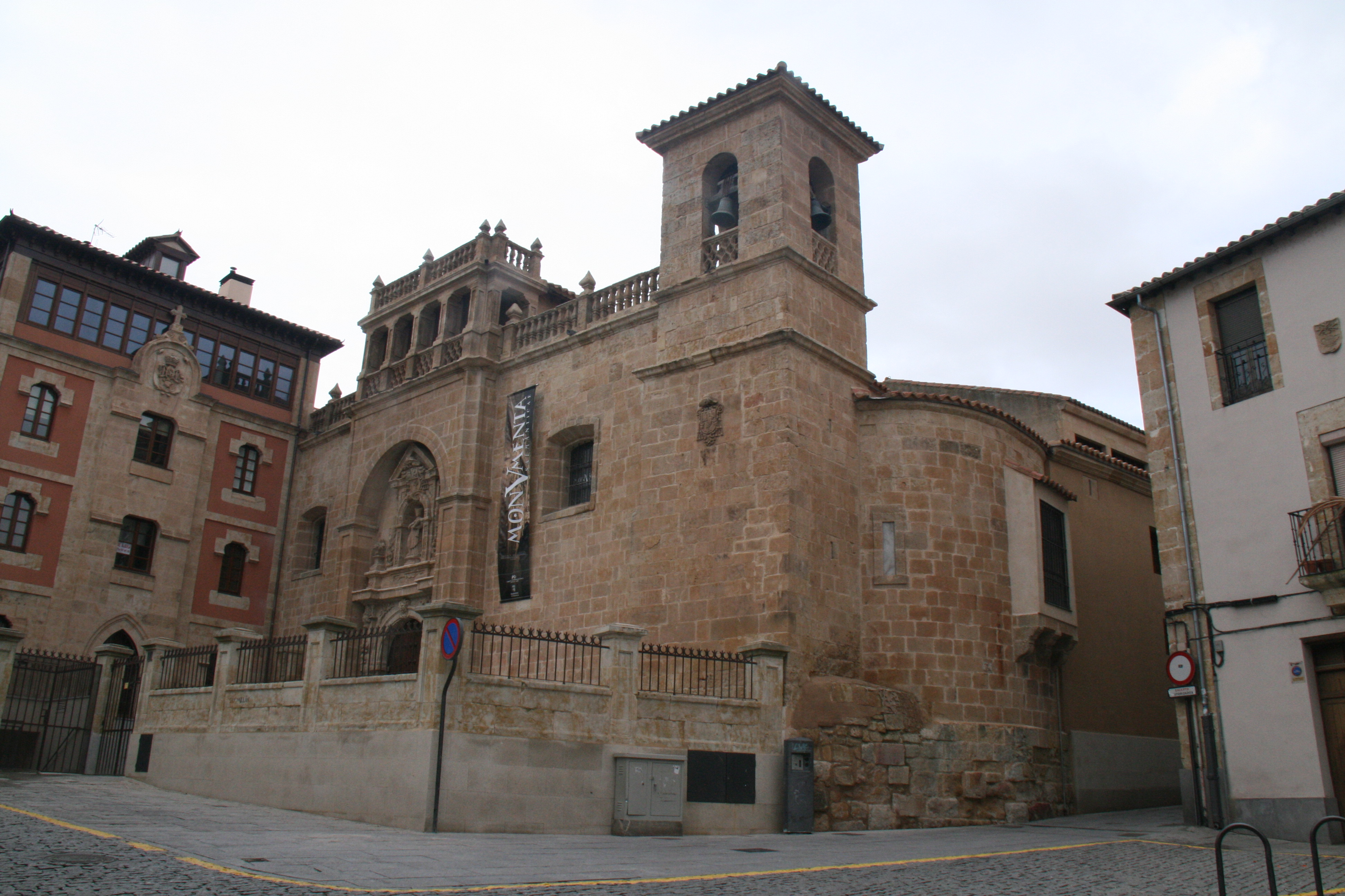 Iglesia de San Millan